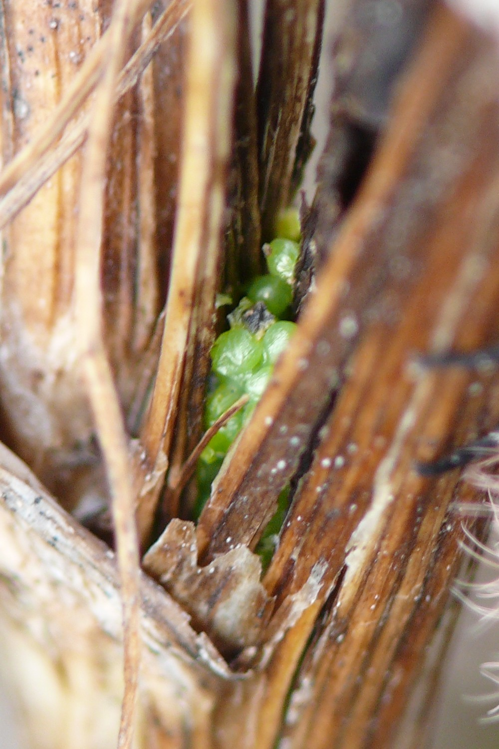 Eier des Trockenrasen-Dickleibspanners (Lycia zonaria), Münchner Umland